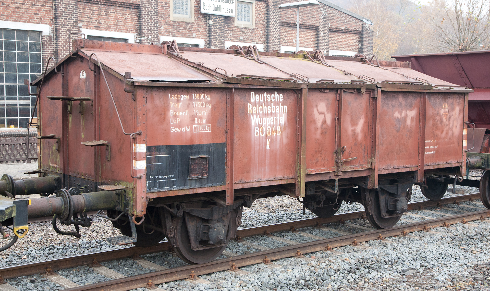 Klappdeckel Güterwagen der Bauart Elberfeld (später als Wuppertal bezeichnet)